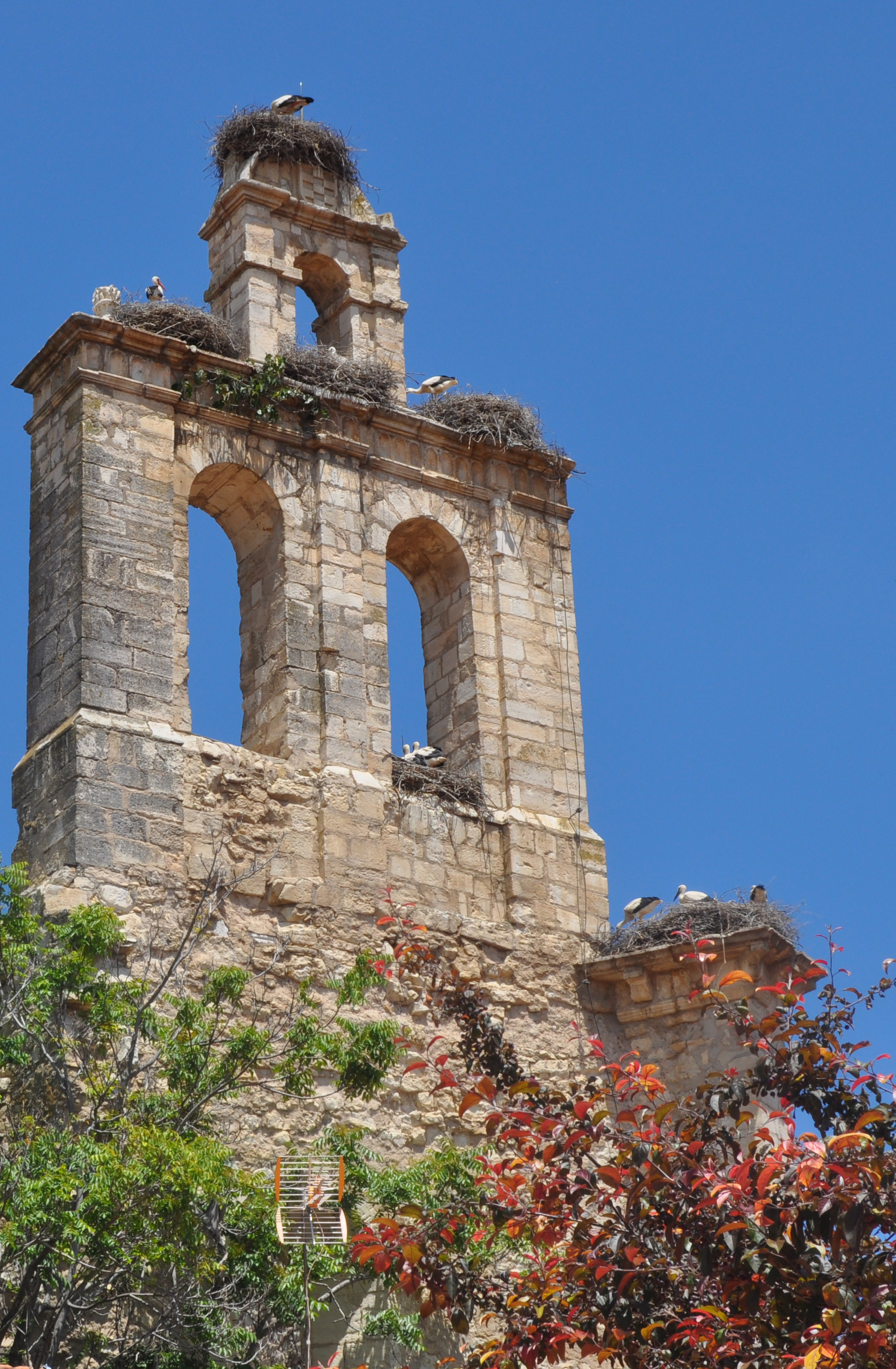 Espadaña del convento franciscano - Villa de Torrelaguna (Madrid)